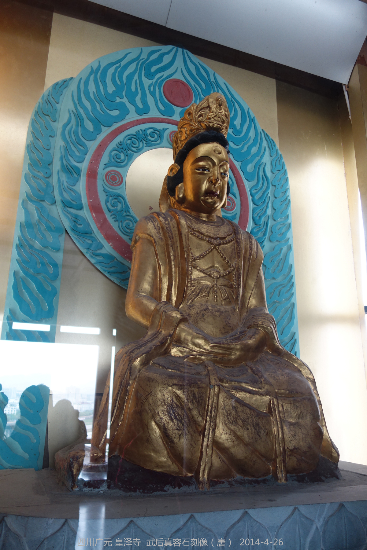 国内唯一武则天真容石刻像（武则天63岁，唐朝）